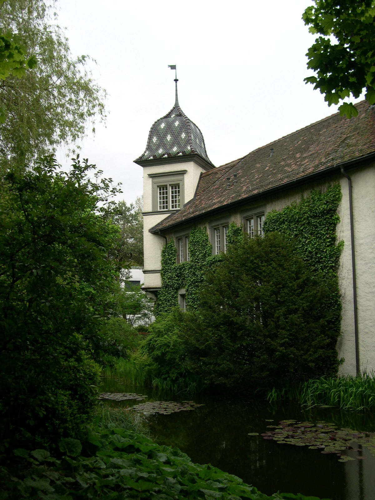 Altes Schloss Bümpliz Fotografiert von Benutzer:Supermutz am 14.5.2005, 16:04